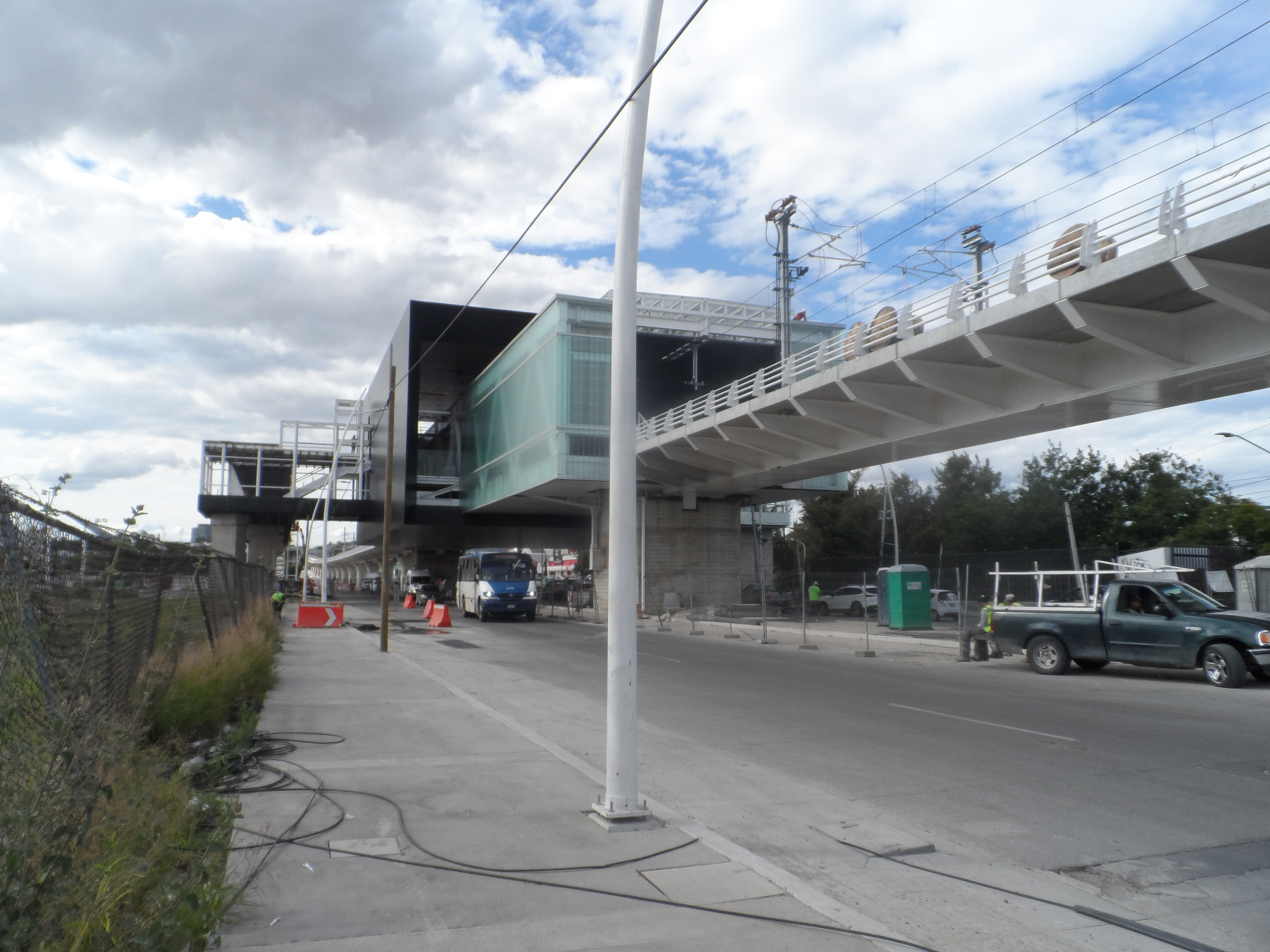 Vista externa de la estación "Plaza Patria" de la Línea 3 del Tren Ligero de Guadalajara.